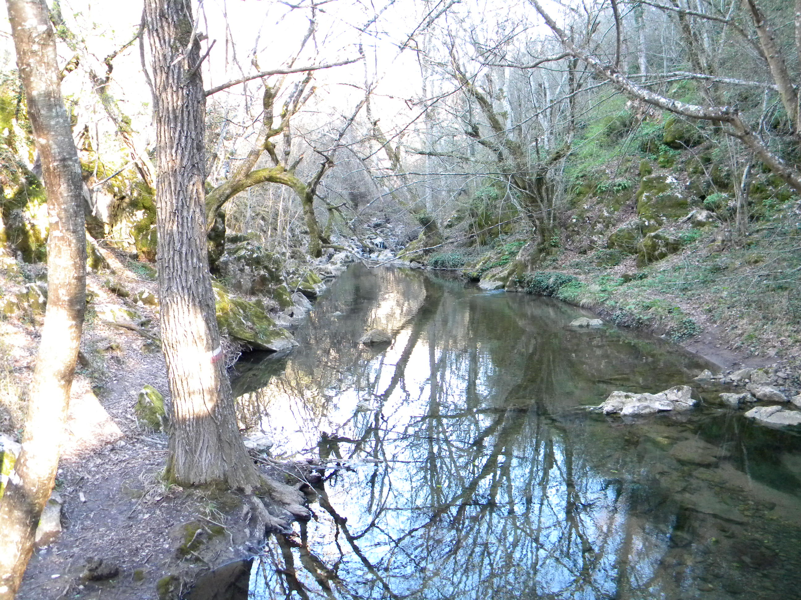 Младежка река